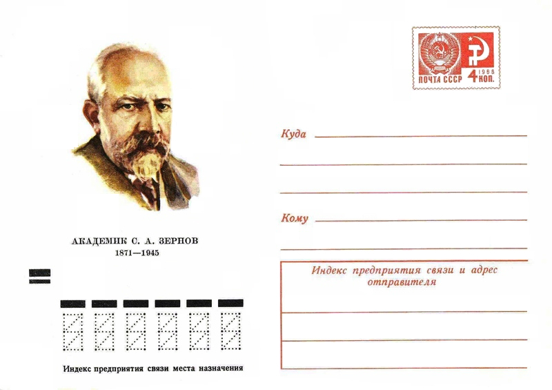 Маркированный конверт СССР 1972 года с изображением Зернова Сергея Алексеевича (1871 - 1945) - русского советского ученого, зоолога и гидробиолога, академика